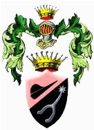 insegne dello Speron di Ferro